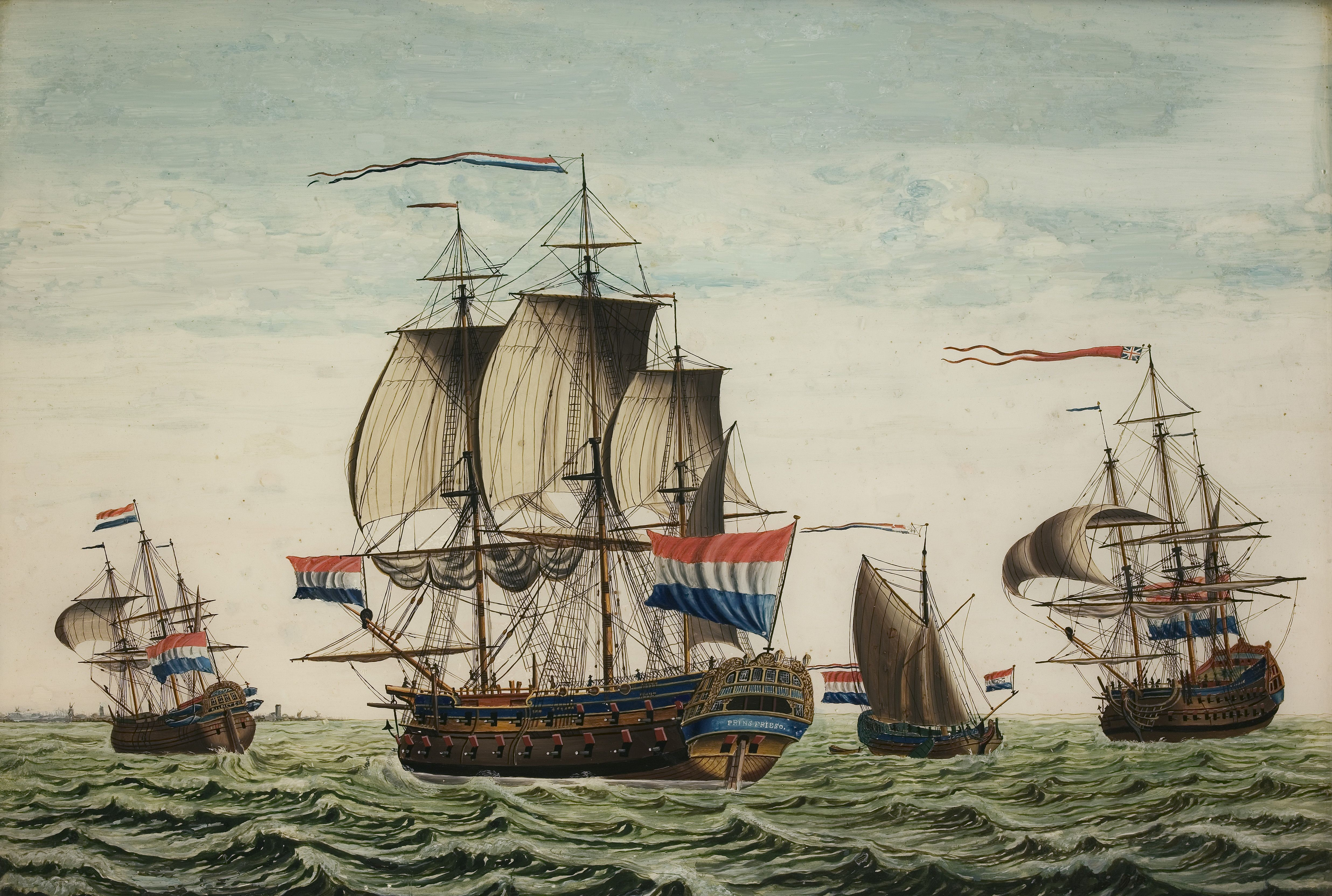 Het linieschip Prins Friso